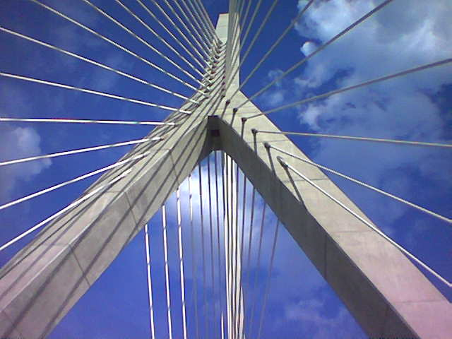 Zakim Bridge in Boston, MA.Zakim Bridge